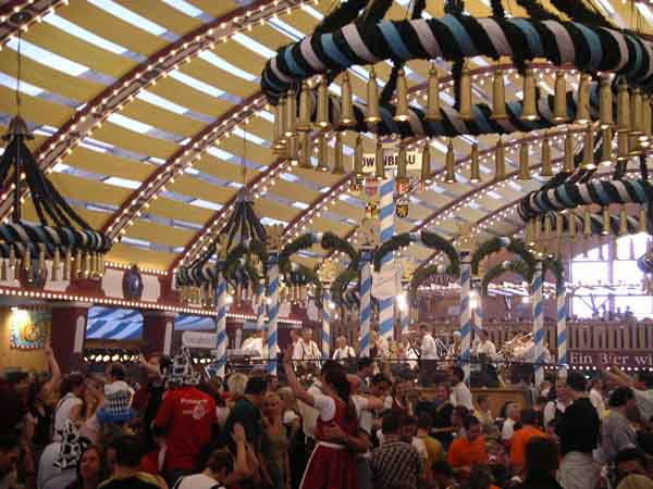 Oktoberfest München (Bierzelt)